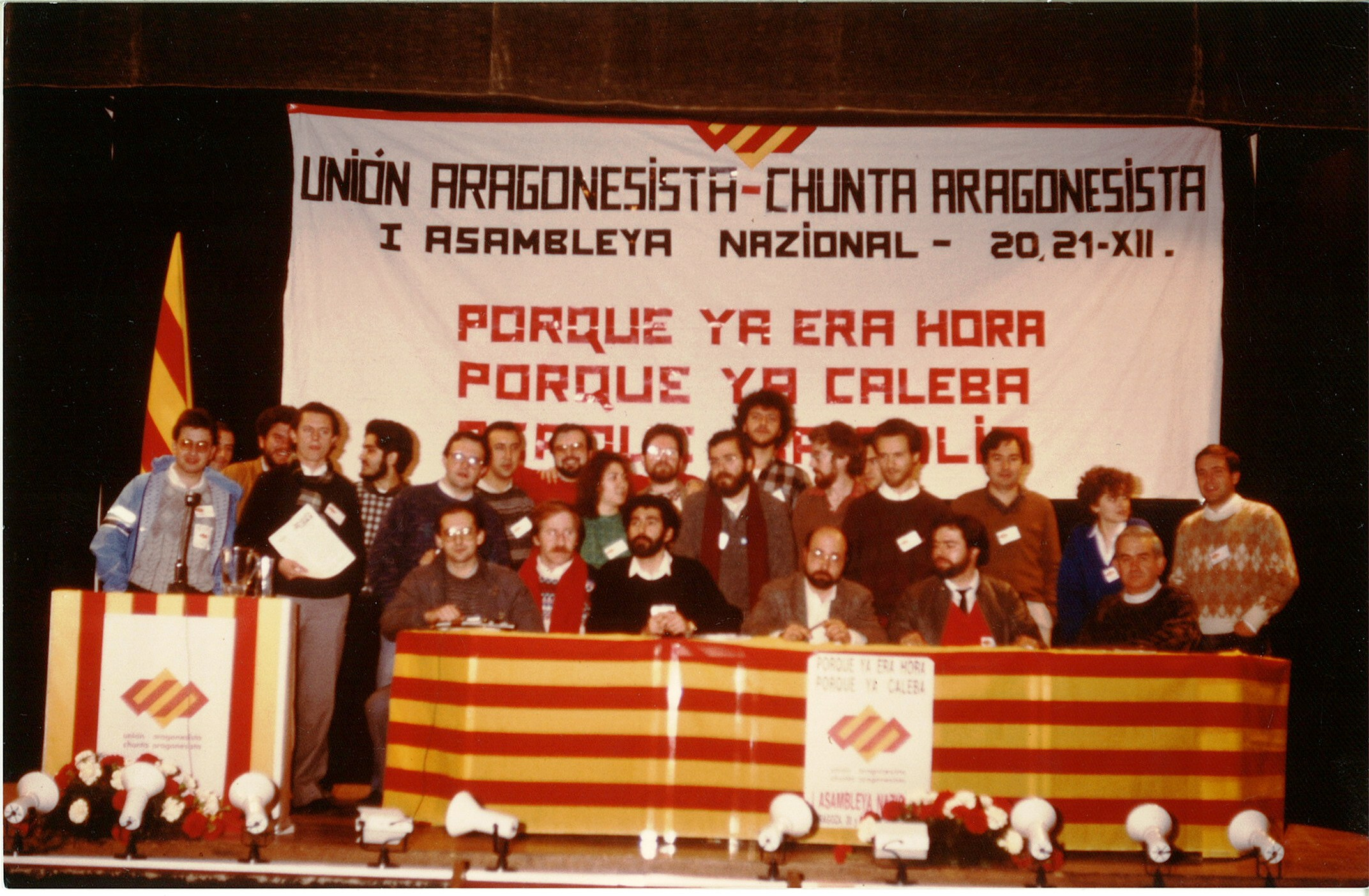 I Asambleya Nazional Unión Aragonesista